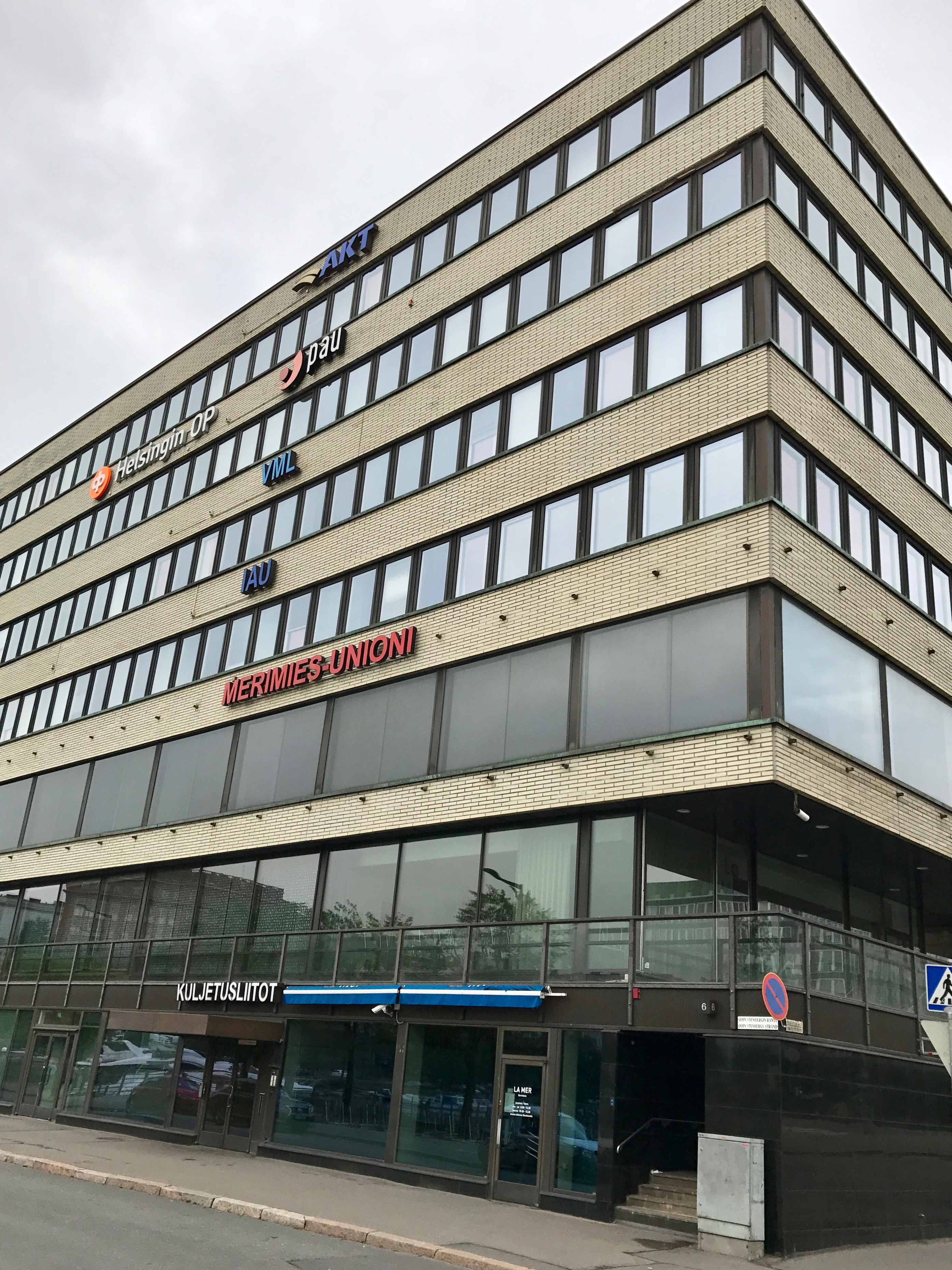 Toimistorakennus Helsingin Hakaniemessä, John Stenbergin ranta.